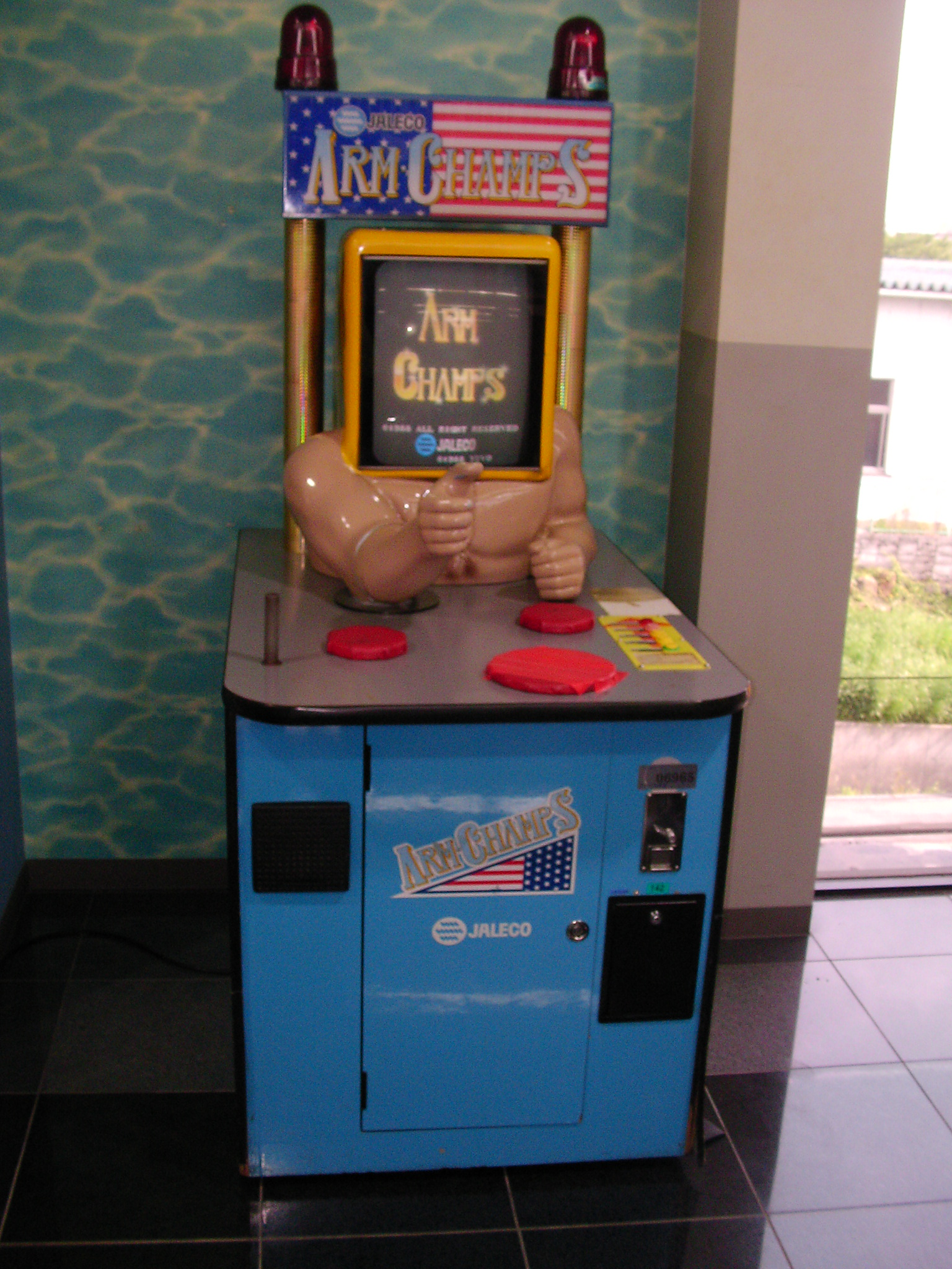 アームチャンプス筺体